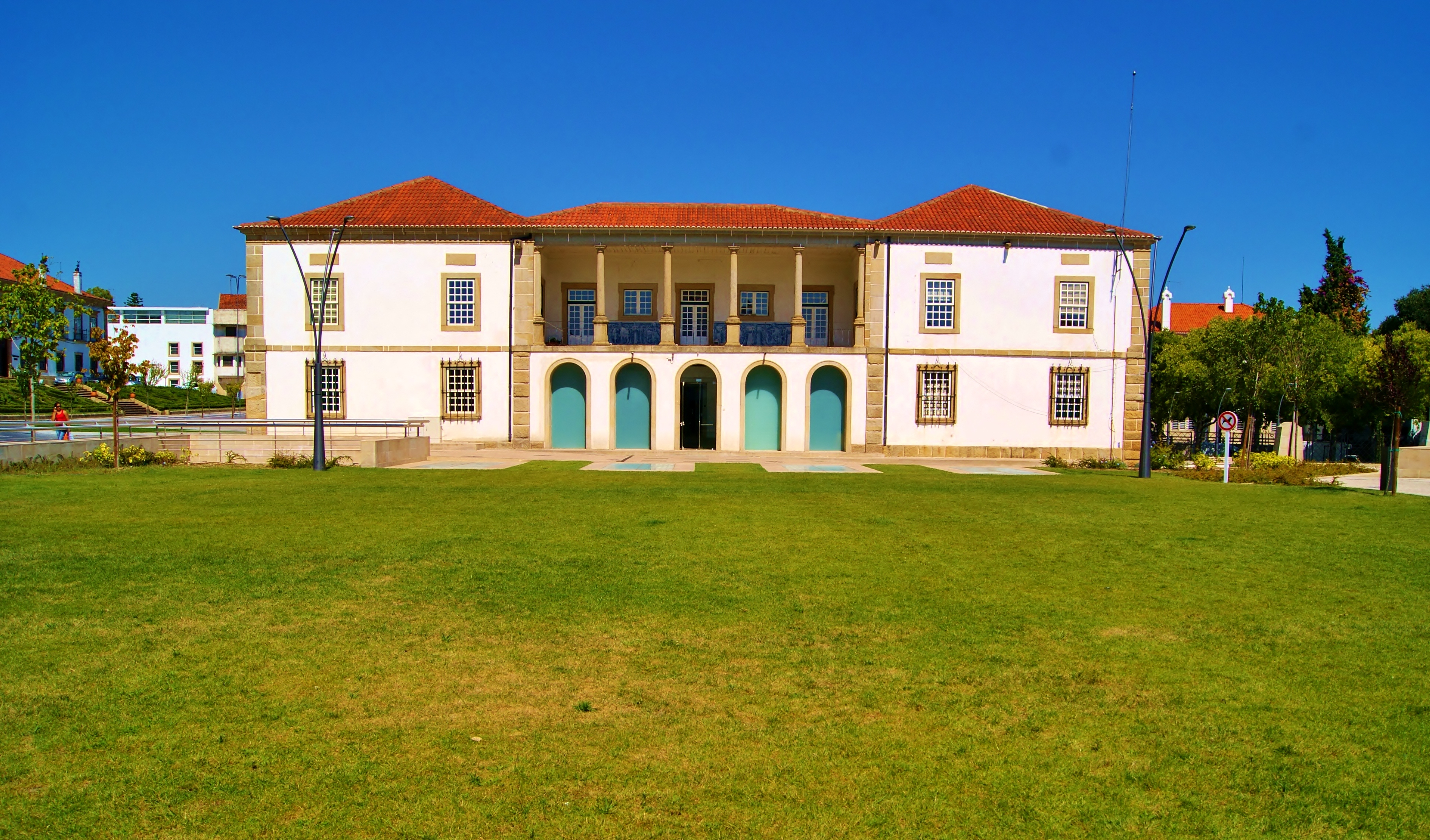 Edíficio da Câmara Municipal de Castelo Branco